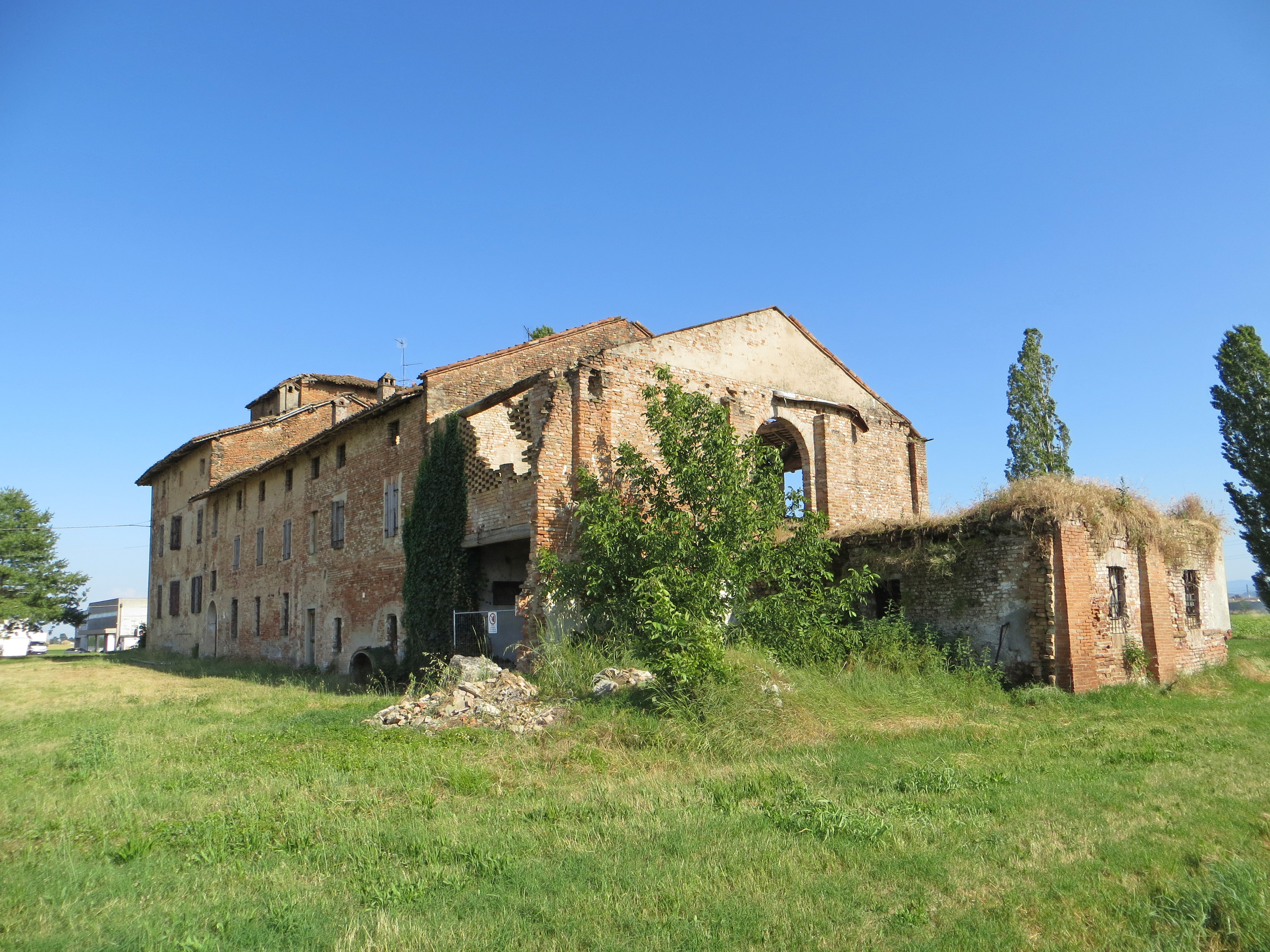 Abbazia (Castione Marchesi, Fidenza) - facciata nord